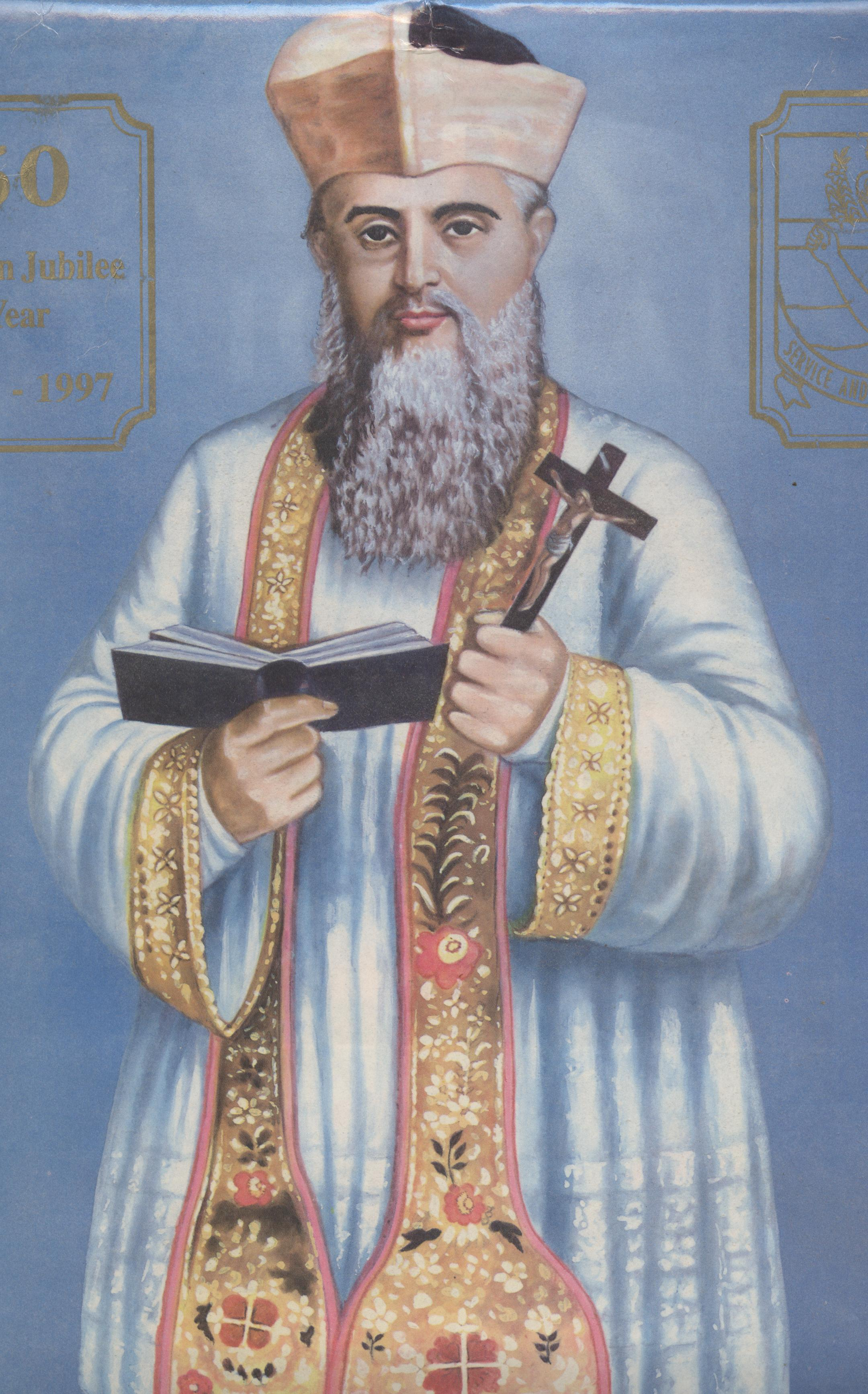 Pater Louis Savinien Dupuis, Ordensgründer in Indien